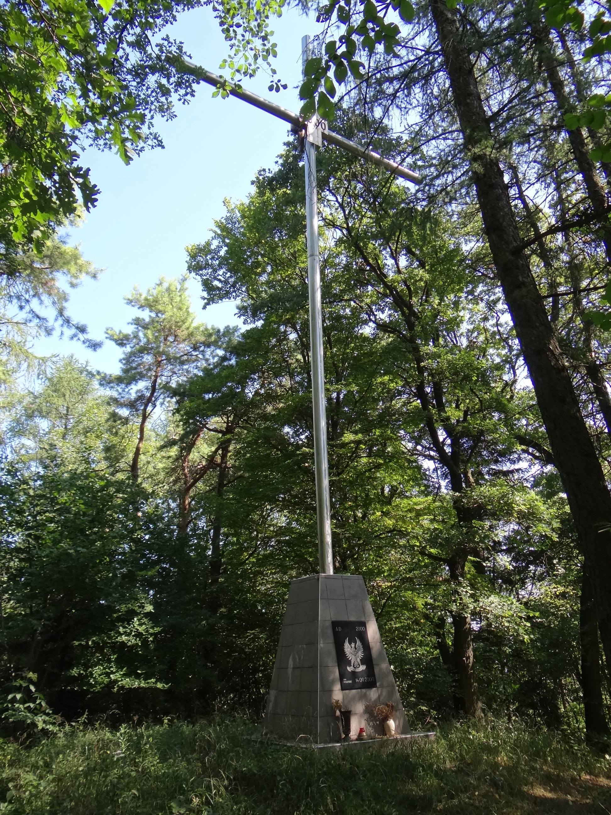 Krzyż milenijny na Panieńskiej Górze